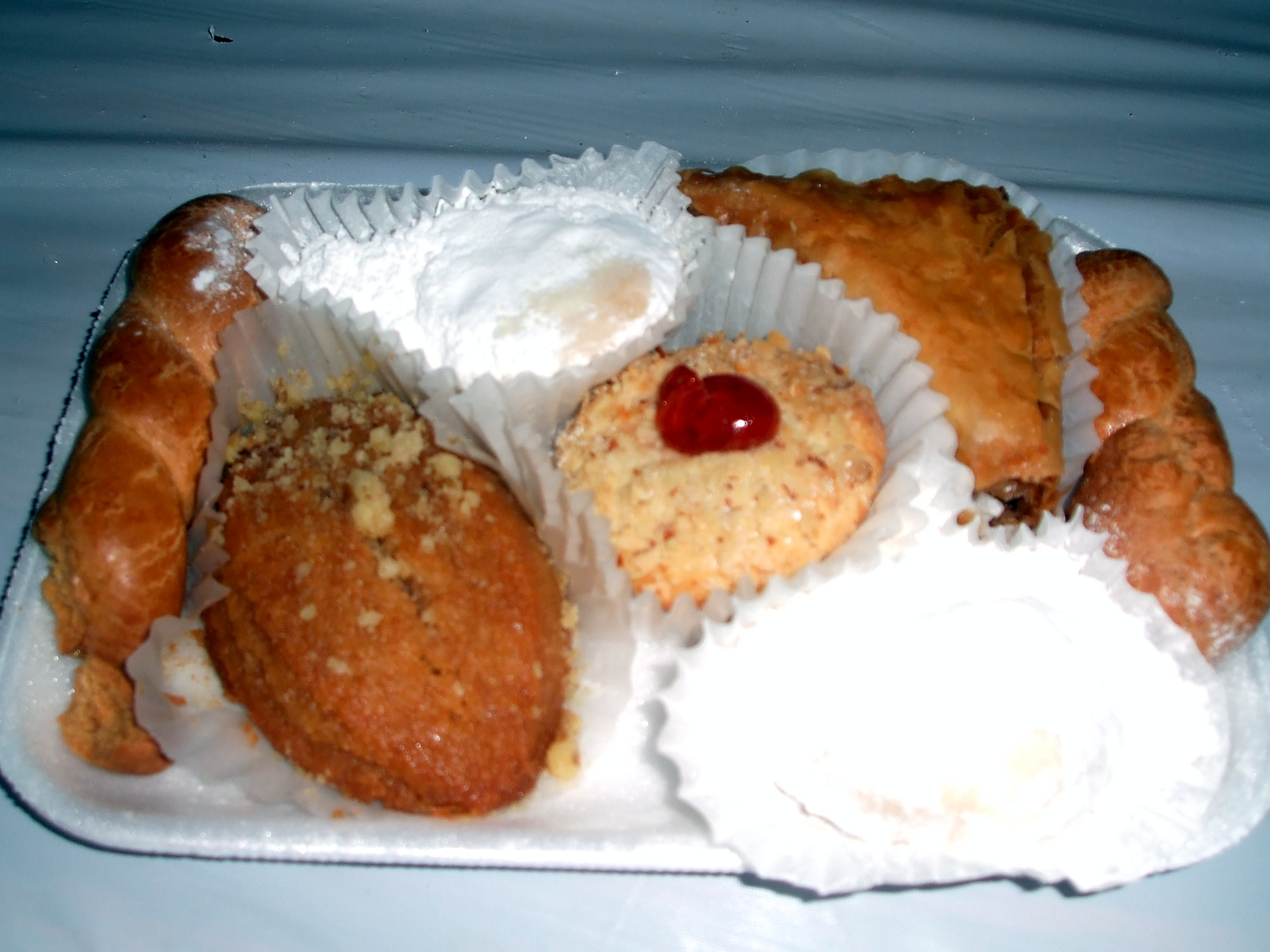 Koulourakia, melomakarona, kourambiethes and kourambedes